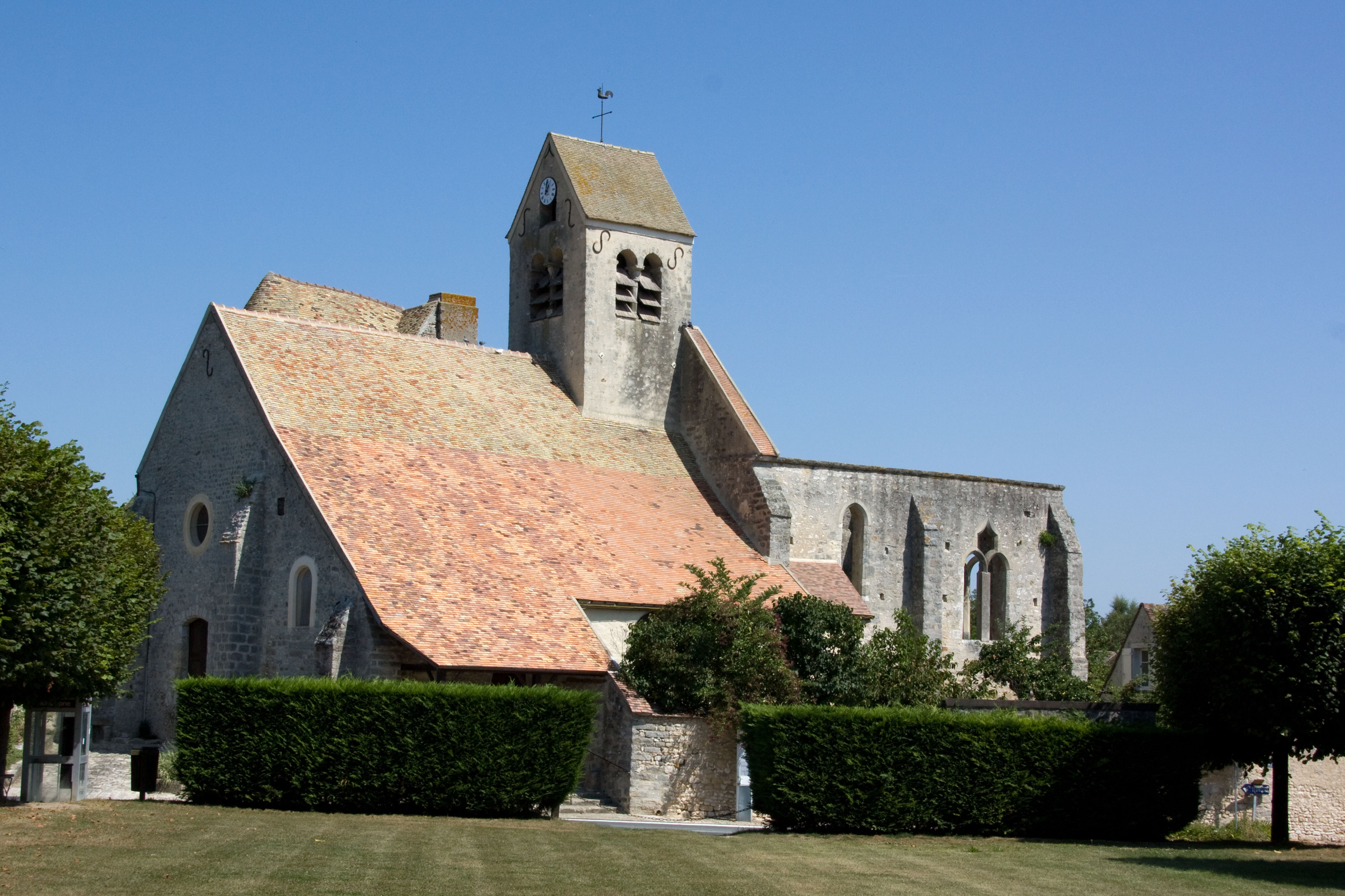 Eglise de Dannemois, Dannemois, Essonne, France